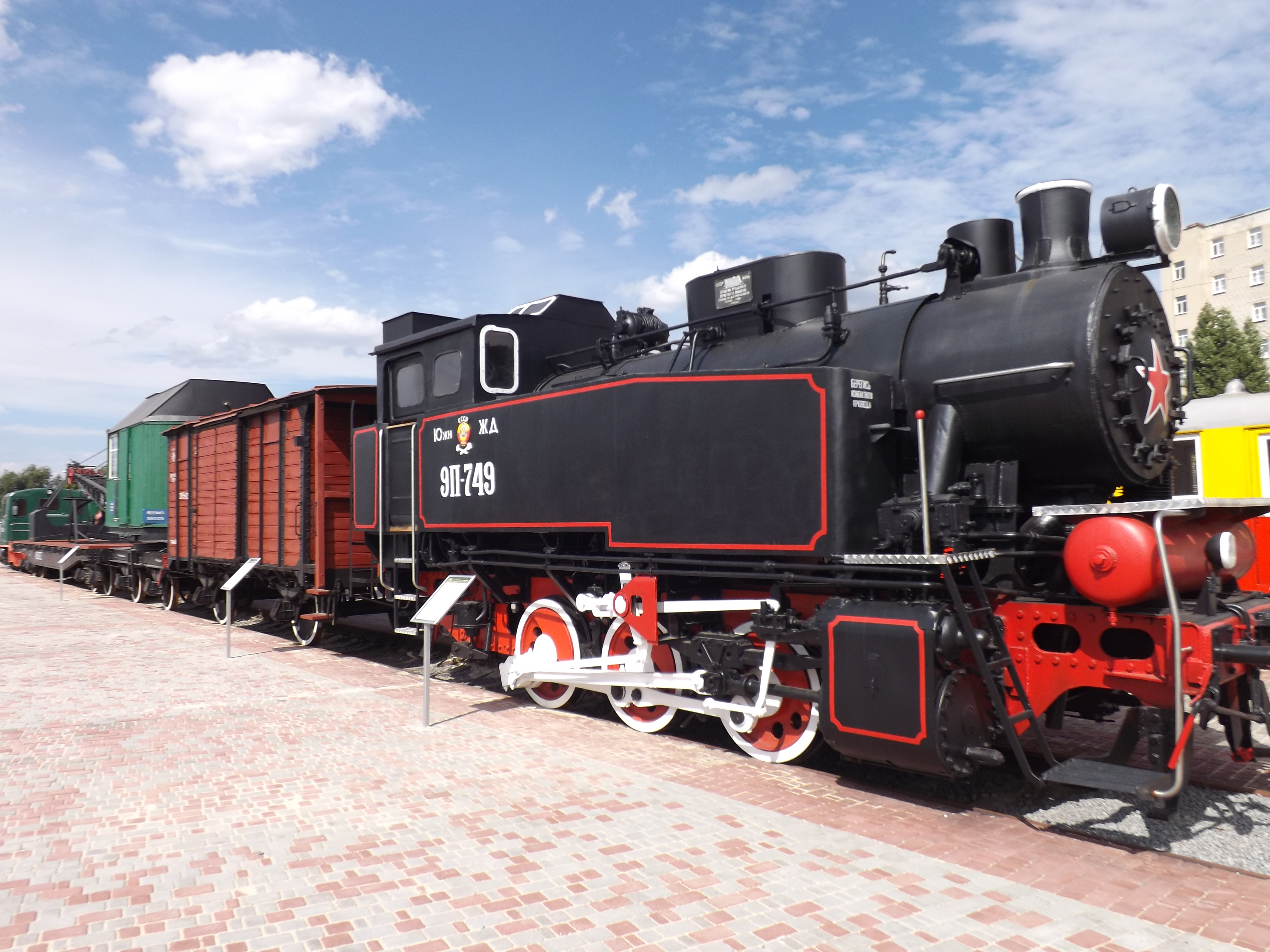 Україна. Харків. Музей історії та залізничної техніки Південної залізниці. Паротяг 9П-749. До того як стати музейним експонатом, знаходився у Основ'янському депо, міста Харкова